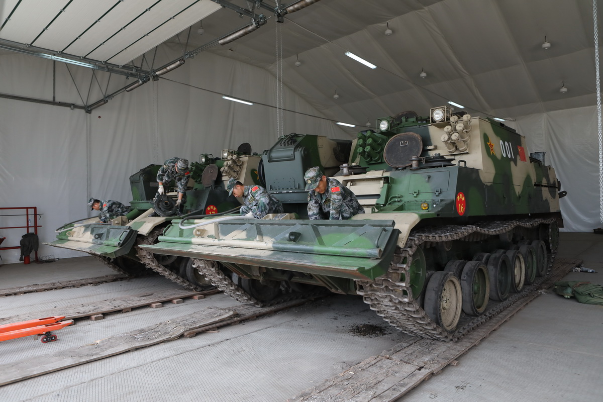 Финальный этап подготовки к международному конкурсу «Рембат-2017» (г. Омск)